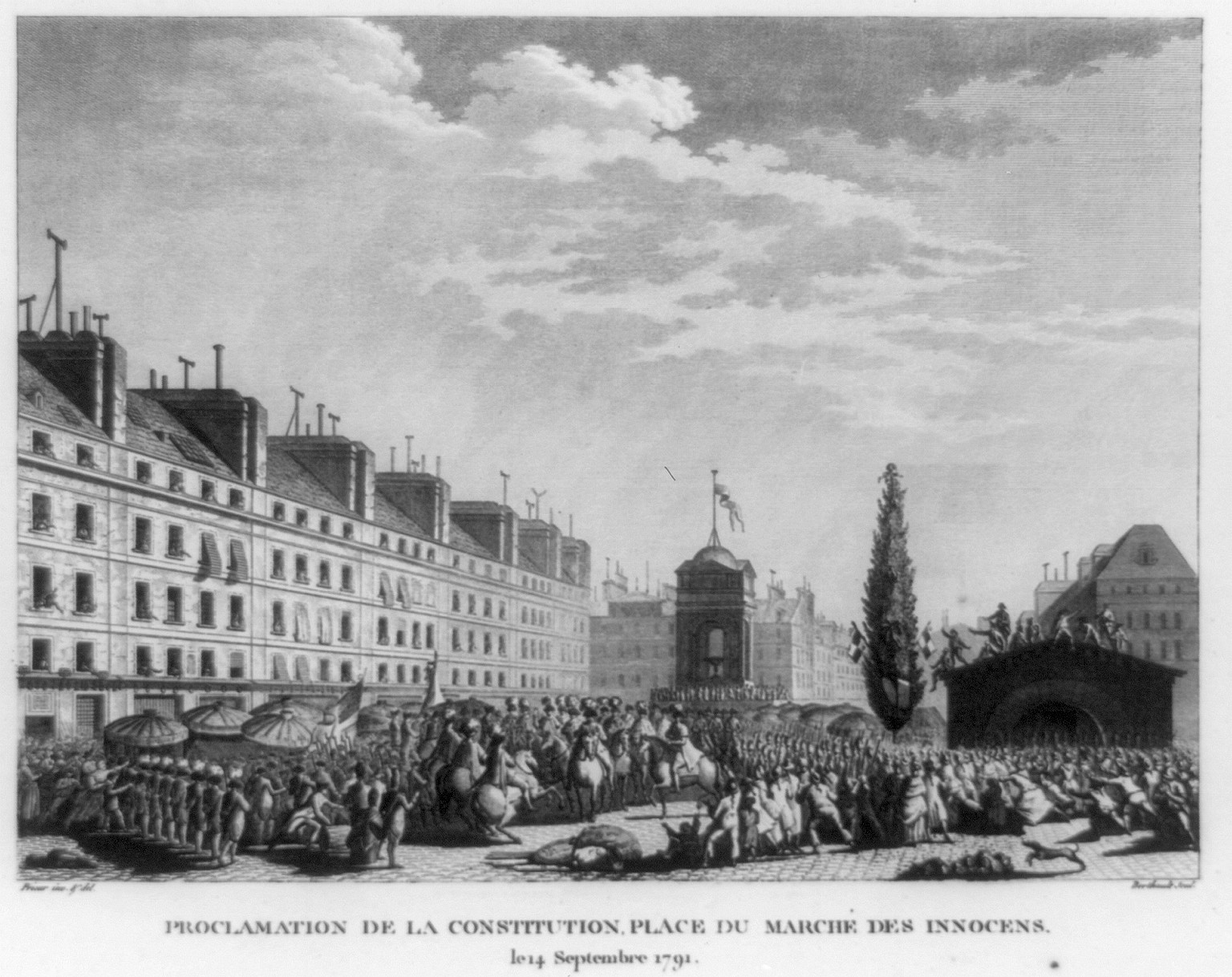 Proclamation of the French constitution in Paris in 1791. "Proclamation de la Constitution, place du Marché des Innocens, le 14 septembre 1791." Plate from "Collection complète des tableaux historiques de la Révolution française", Auber, Paris, 1804.